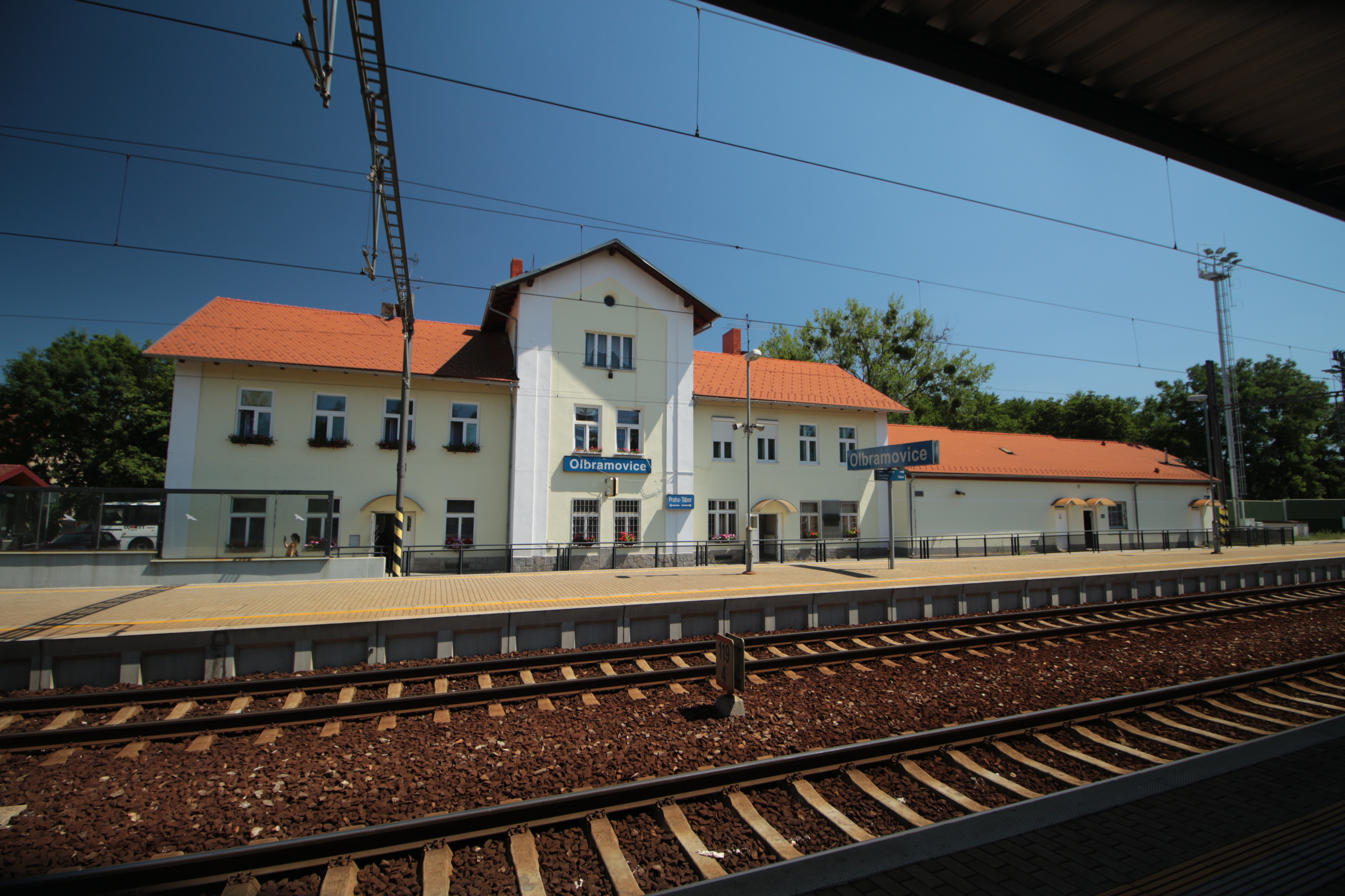 Olbramovice nádraží